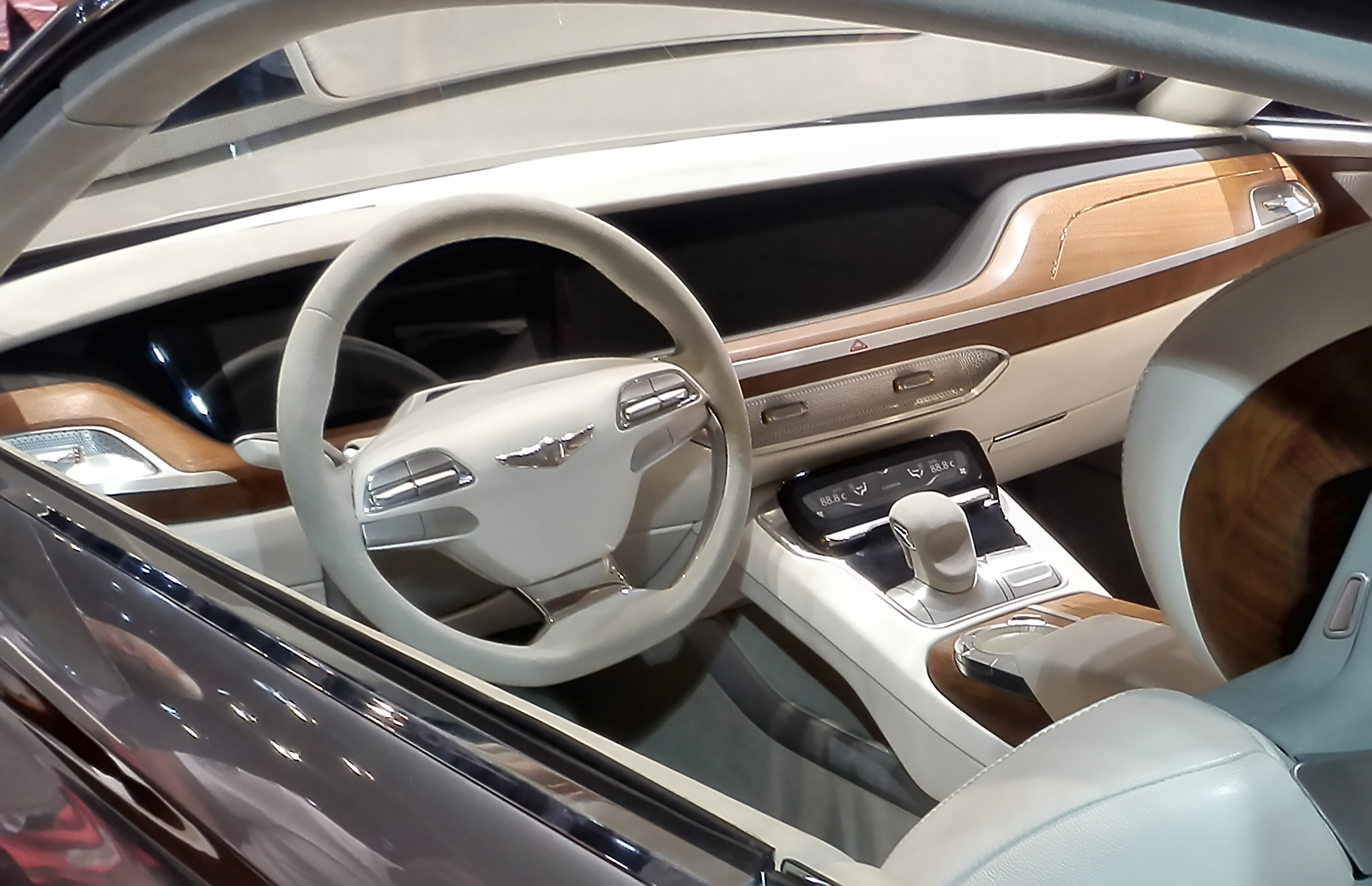 Hyundai Vision G Coupé at IAA 2015